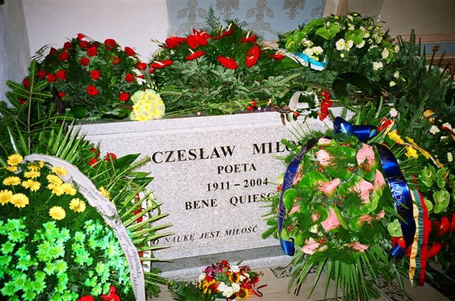 Czeslaw Milosz's monument